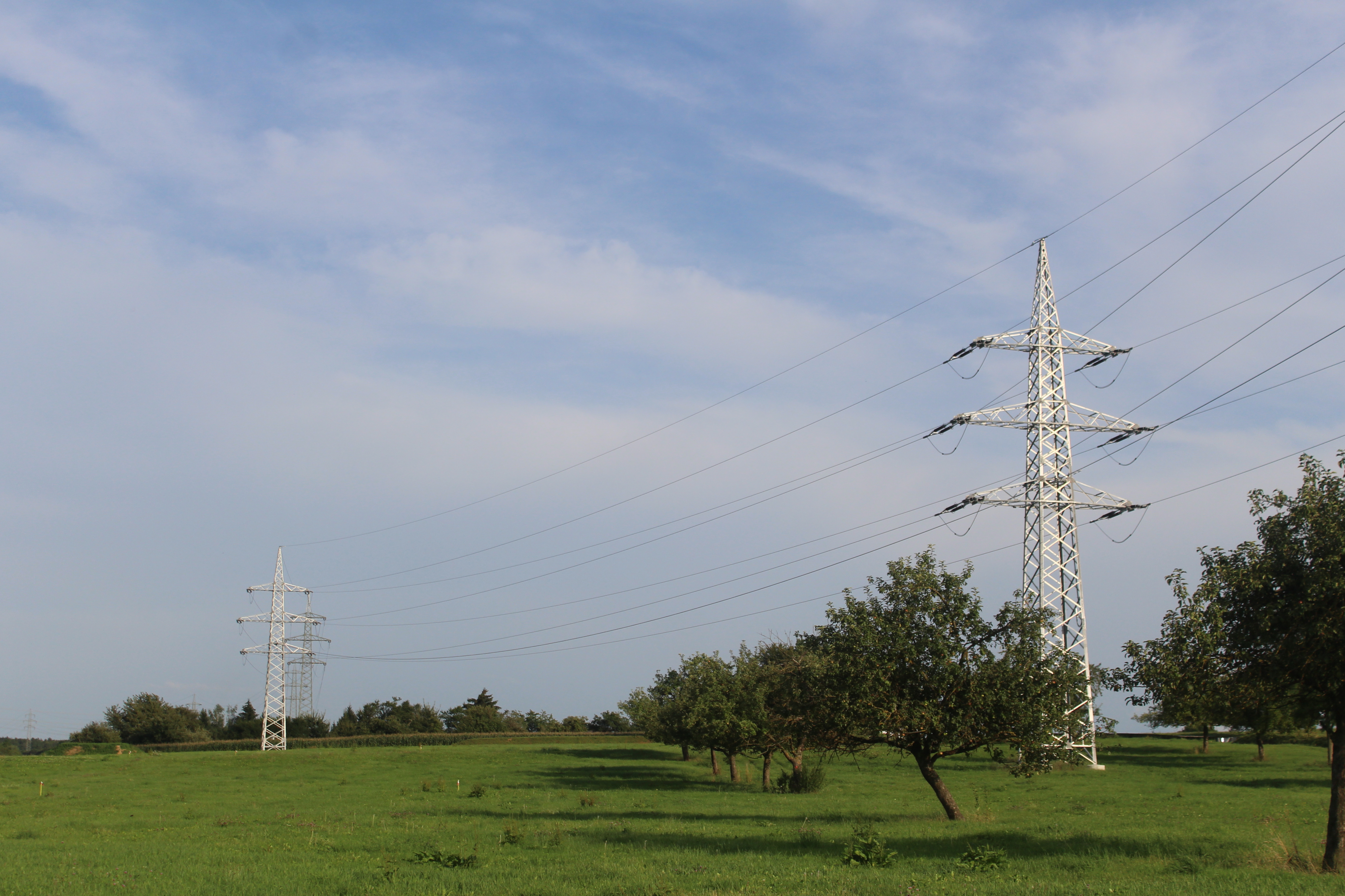 Maste der Anlage 9505 in Wendlingen am Neckar